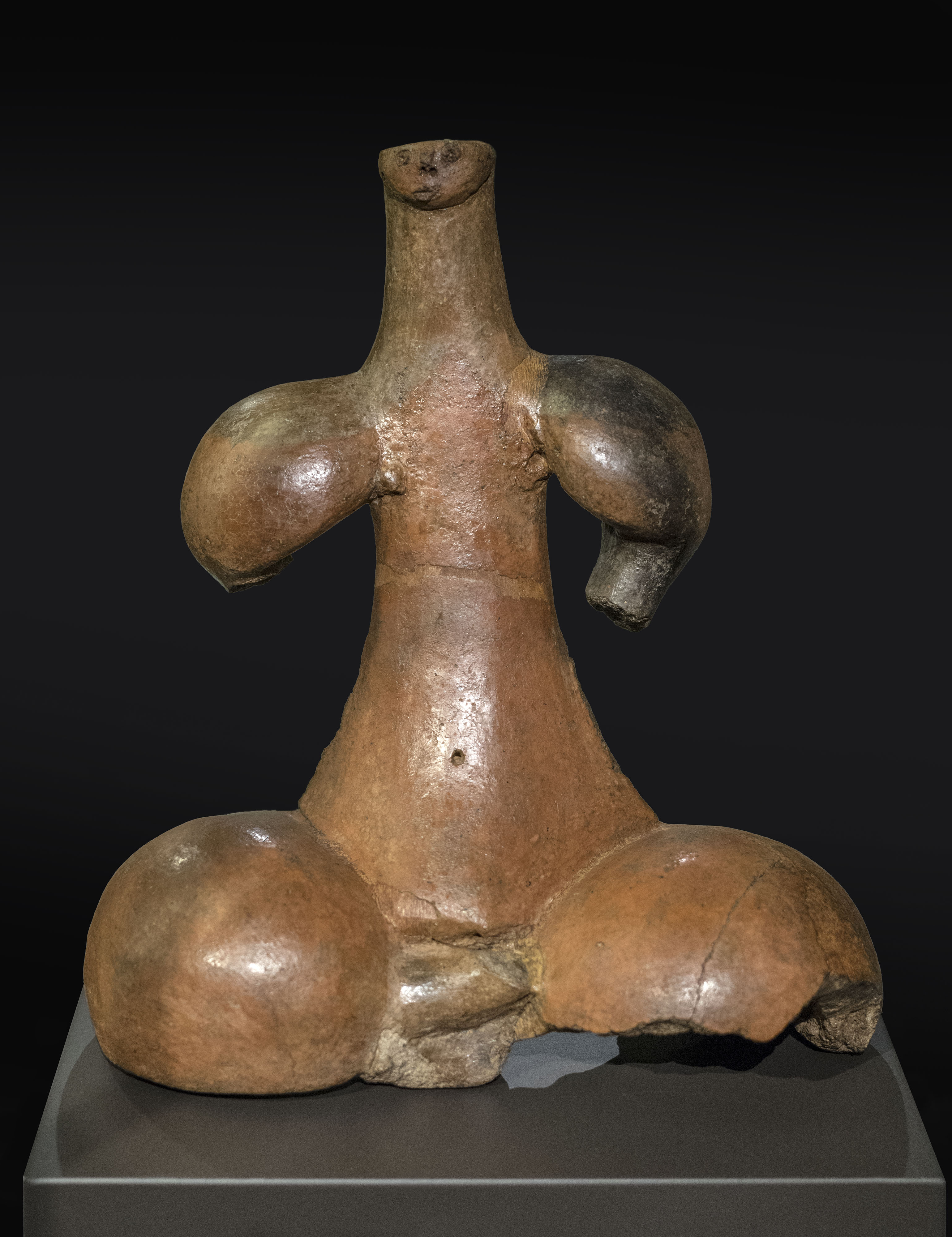 Figura de terracota de unos 27 cm de altura procedente de la isla de Gran Canaria. Se expone en el Museo Canario en Las Palmas. Fotografiado en la exposición temporal "El poder del pasado", en el Museo Arqueológico Nacional.